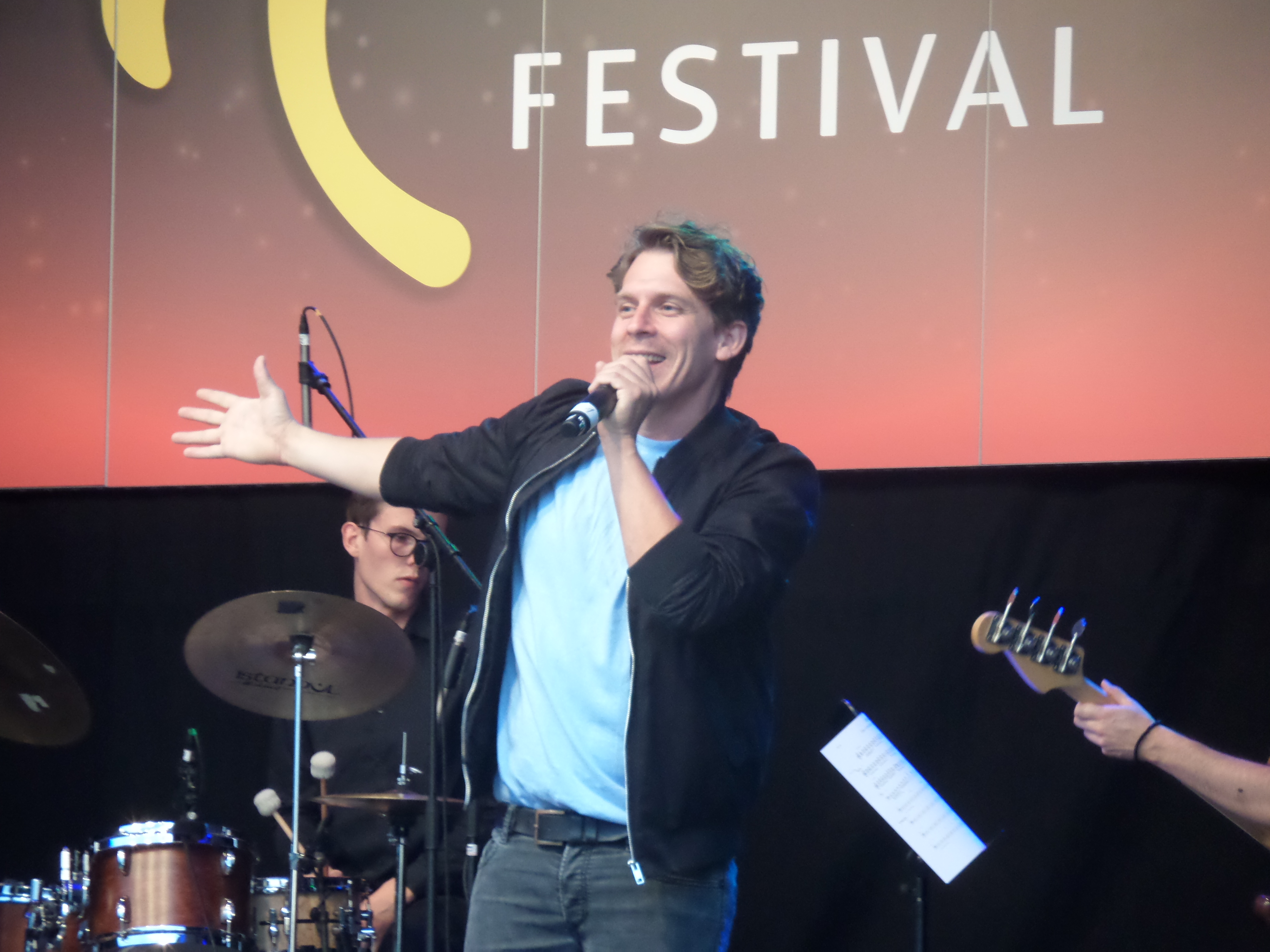 David Jakobs beim Dinklager Musical Festival (2020)